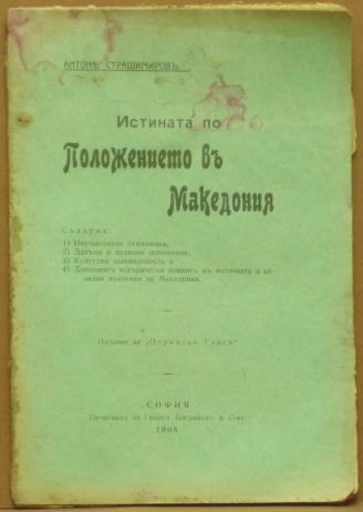 Корица на "Истината за положението в Македония"